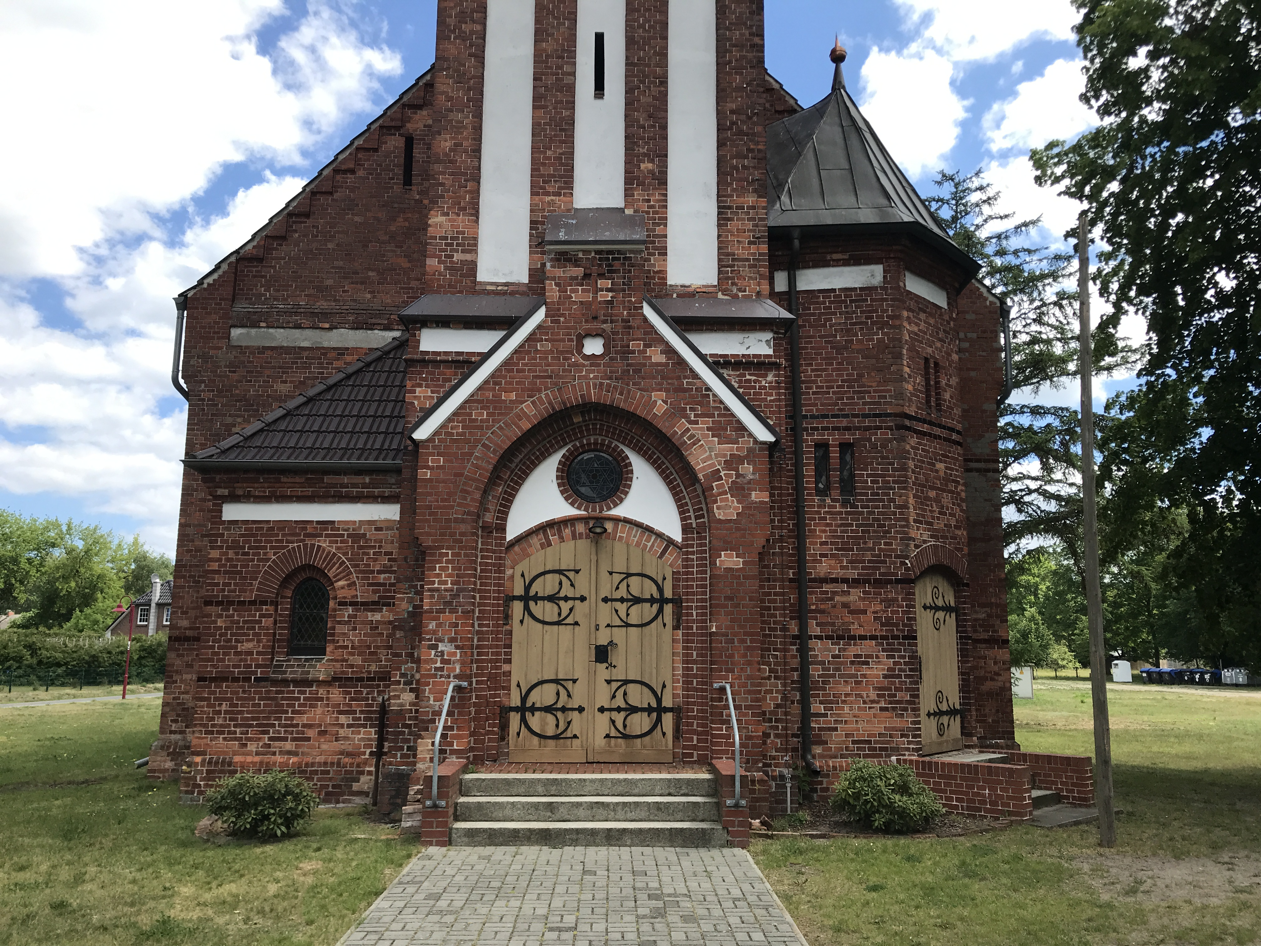 Die Kirche St. Johannis ist eine Saalkirche aus dem Jahr 1899 in Hintersee, einer Gemeinde im Landkreis Vorpommern-Greifswald in Mecklenburg-Vorpommern. Die Kirchenausstattung stammt aus der Bauzeit.